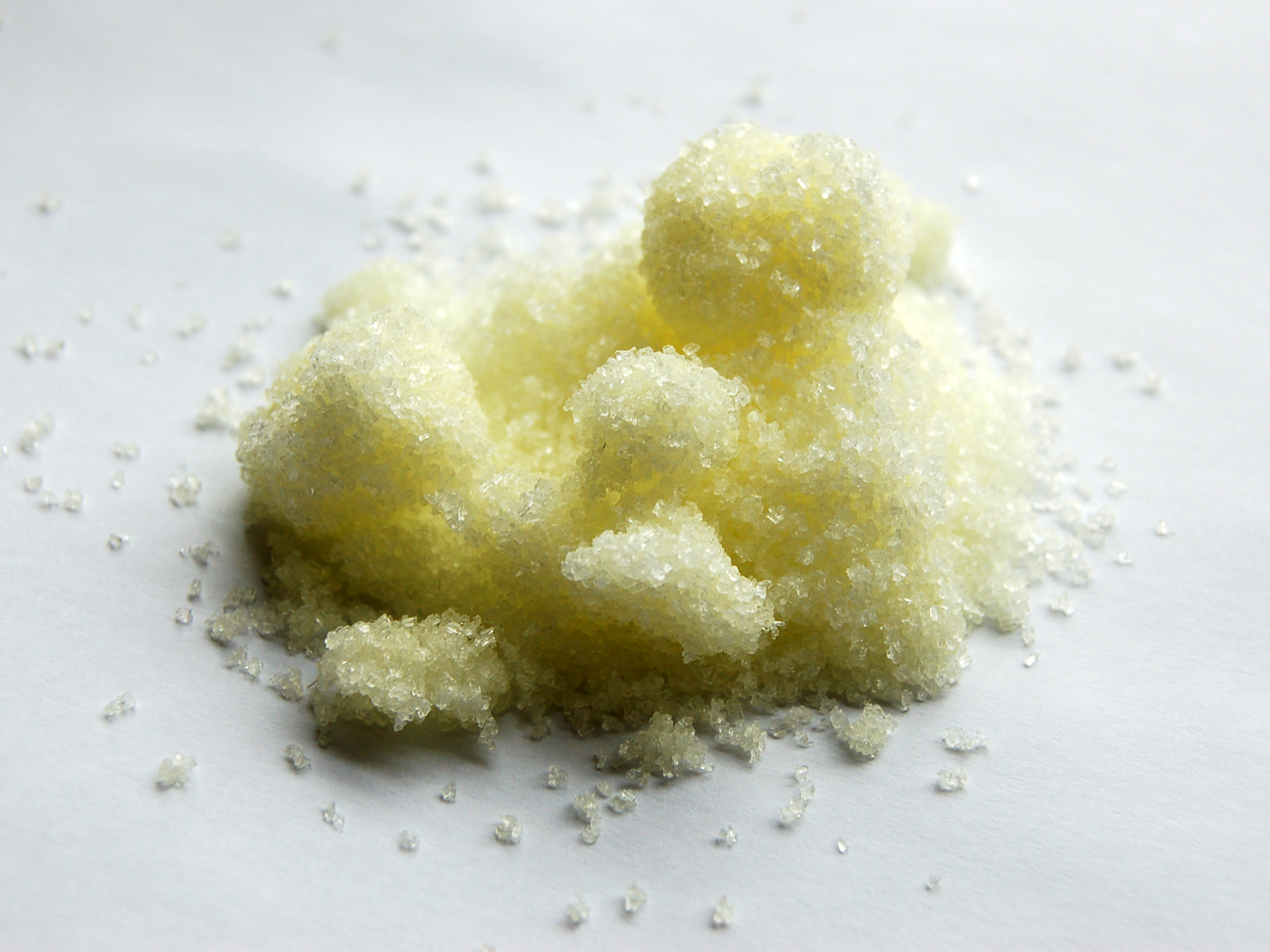 Aluminium trichloride hexahydrate sample